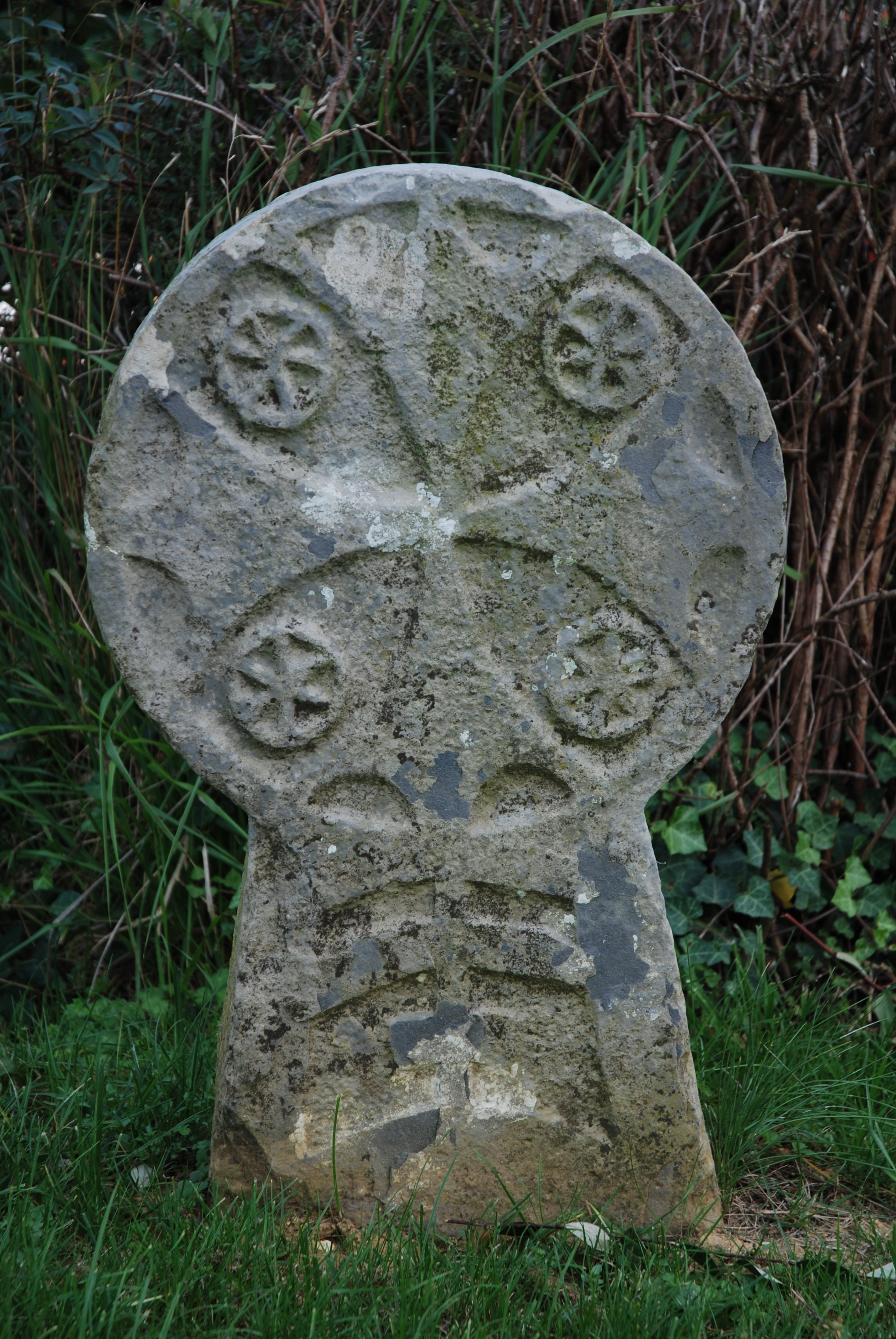 Isturits, stèle discoïdale